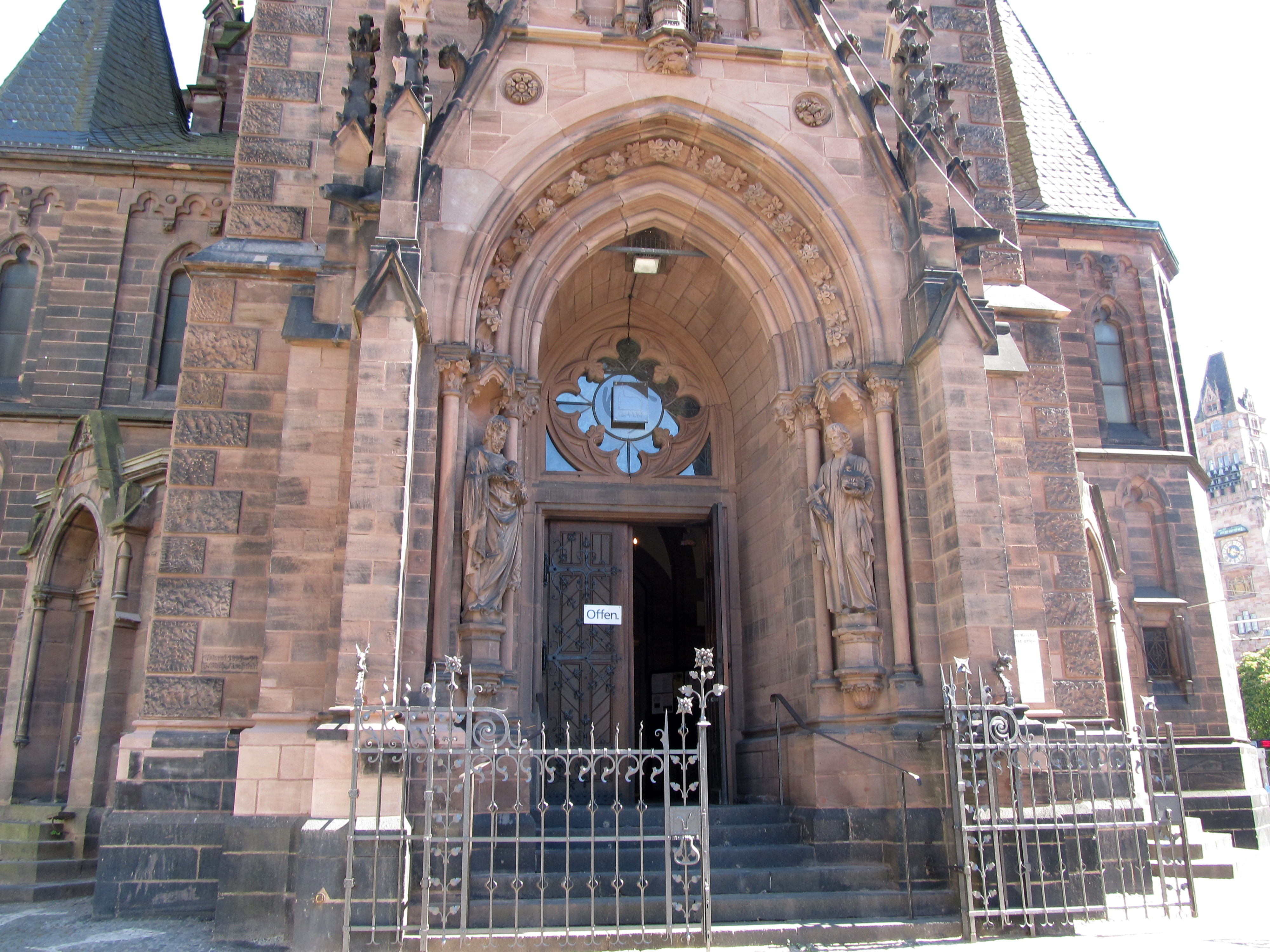 Hauptportal der Johanneskirche in Saarbrücken, Saarland